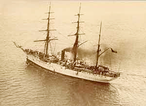 Corbeta general Baquedano, de la Armada de Chile